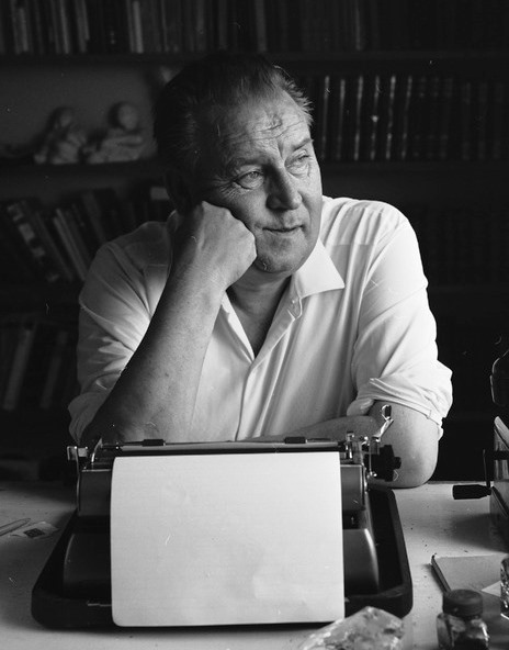 bolig, interiør, mann, forfatter, visesanger, sittende halvfigur ved skrivebord, skrivemaskin, bokhylle. Rigmor Dahl Delphin (1908-1993) var ansatt som fotograf i ukebladet Alle Kvinner. Hennes negativarkiv ble i 2005 overført Oslo Bymuseum fra Gyldendal Norsk Forlag som var utgiver av bladet.